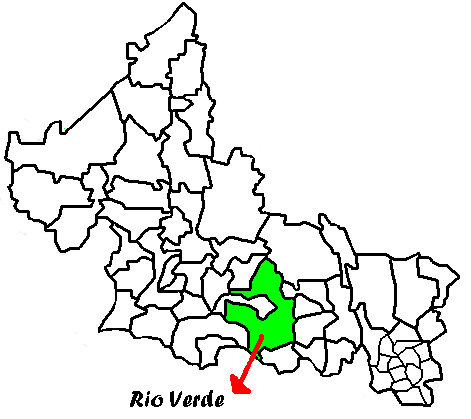 Mapa de Rio Verde, del estado de San Luis Potosí en México. Autor Israel T. G.